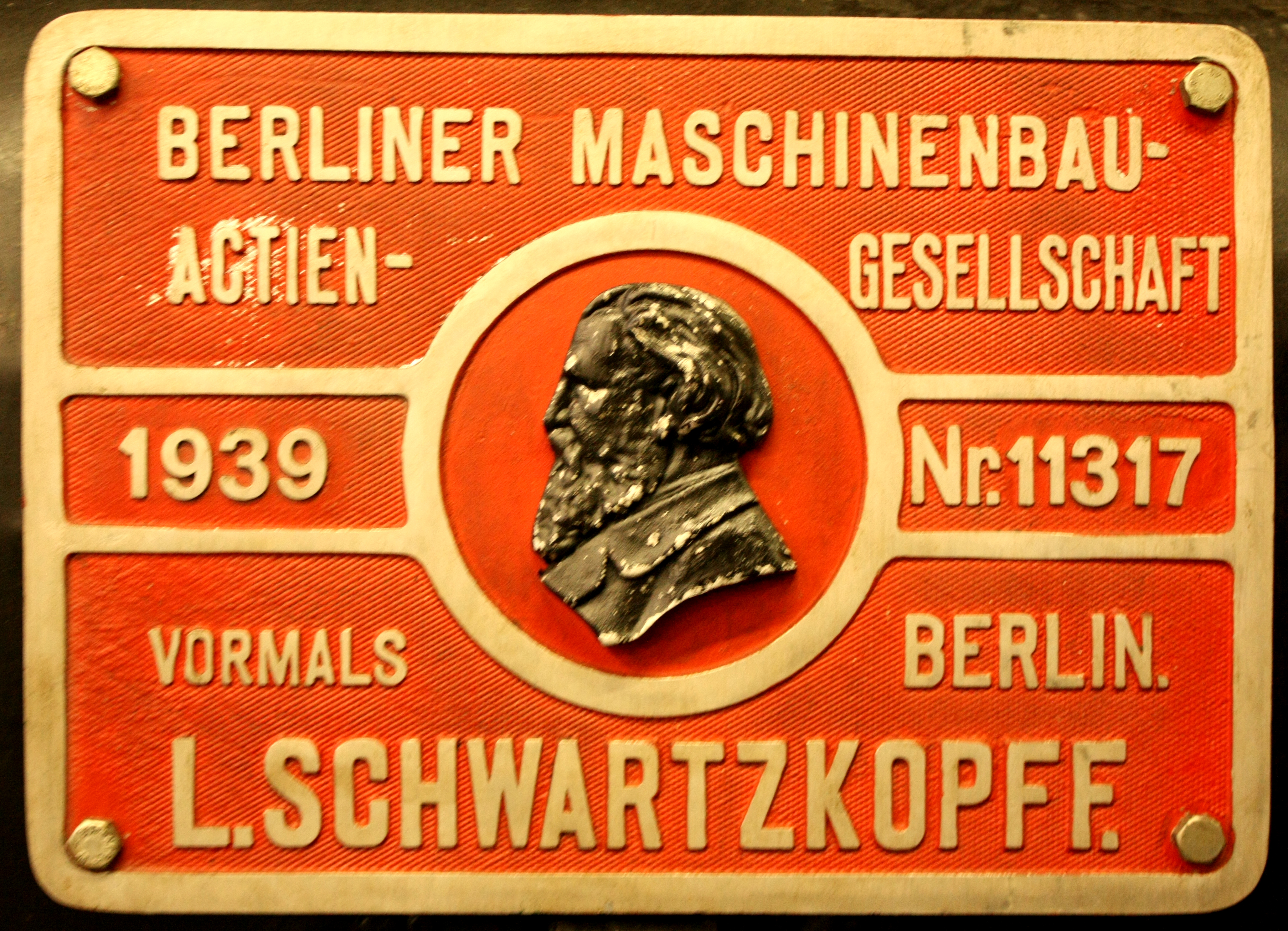 Berliner Maschinenbau AG (Schild an einer Lok im DDM